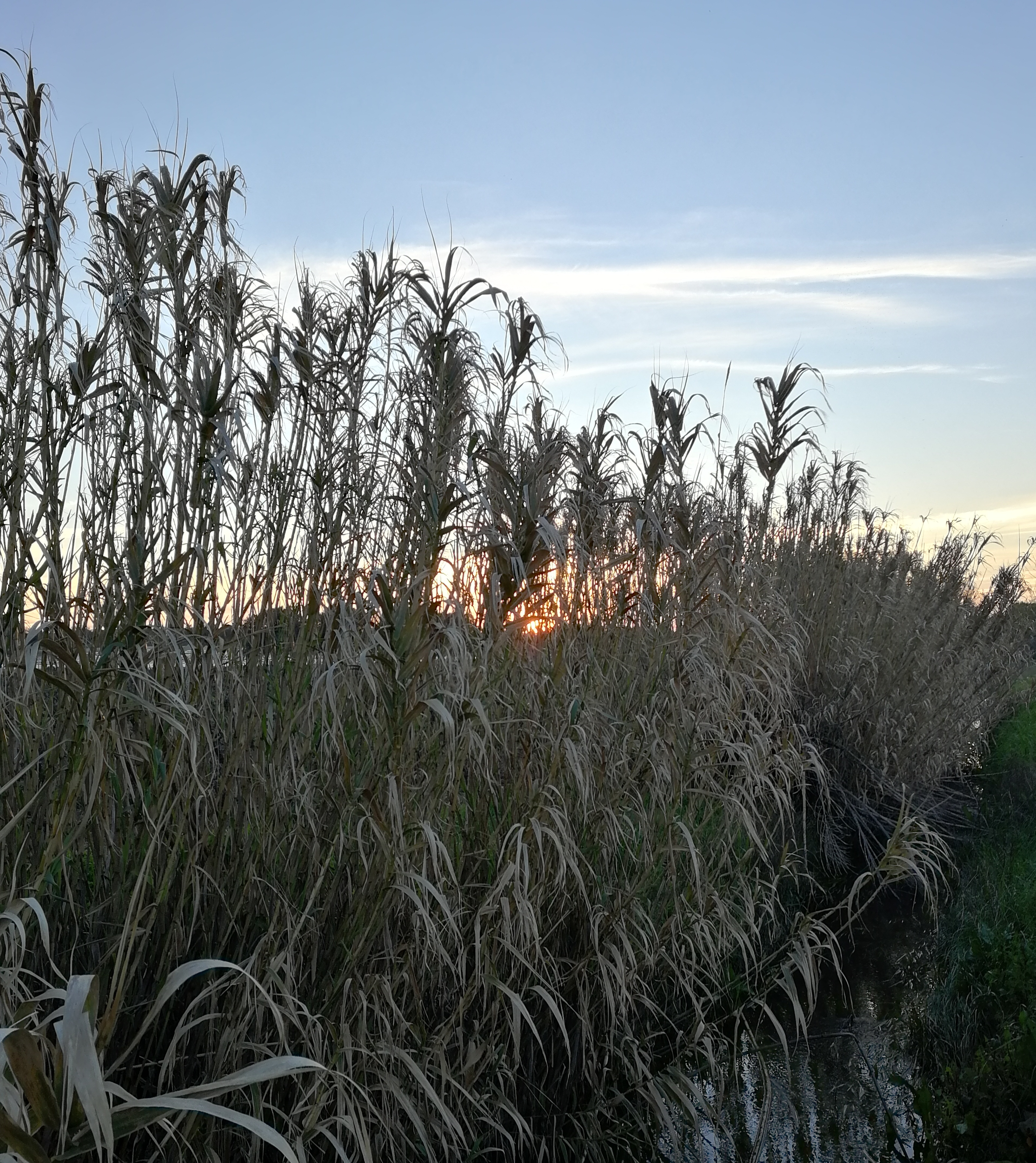 tramonto